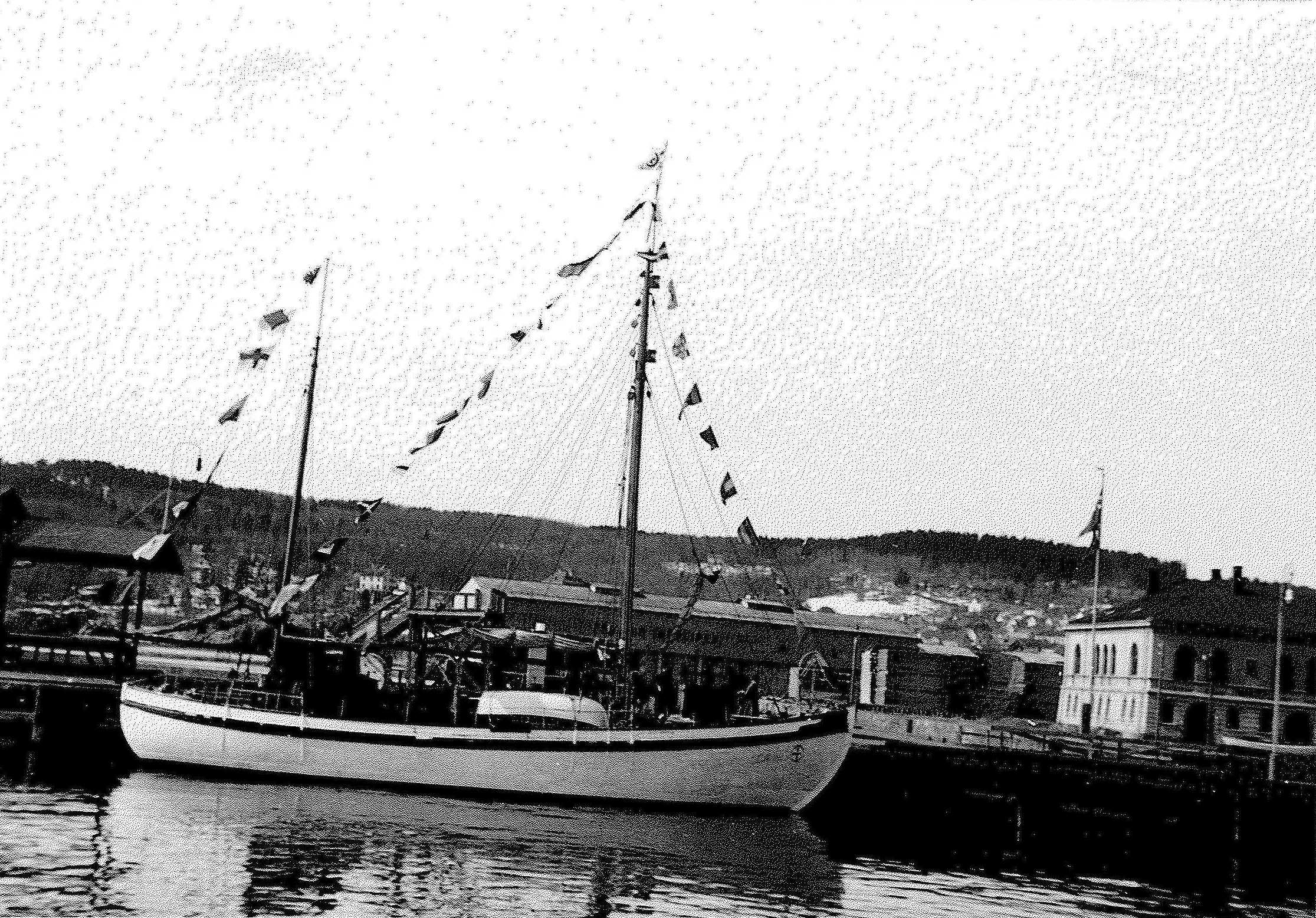 Fredrik Langgaard RS 51